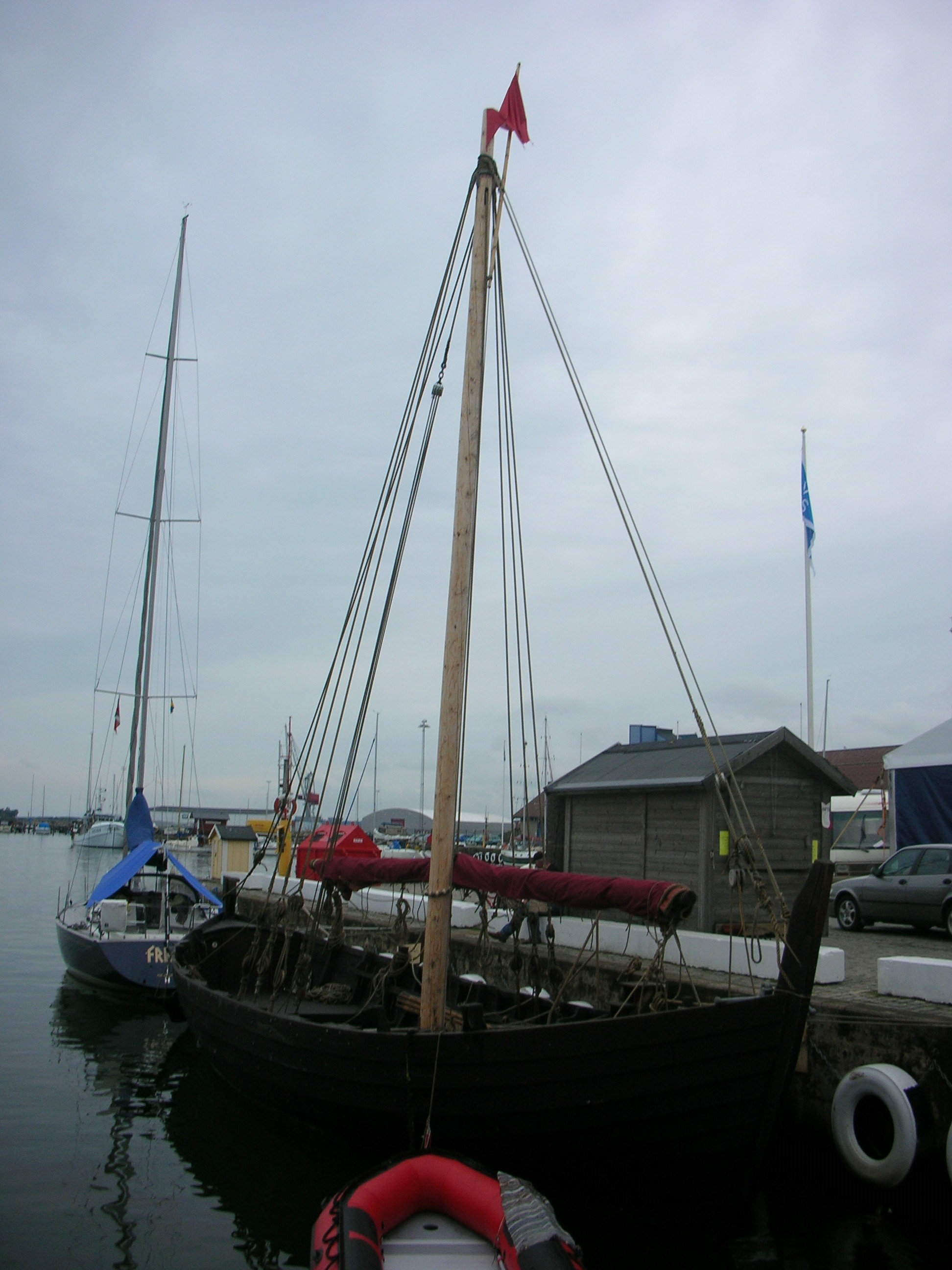 Replika av Galtabäcksskeppet, kallad Galten.